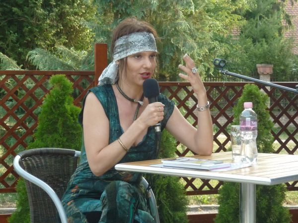 Könyves Szerda előadás Karafiáth Orsolya költőnővel